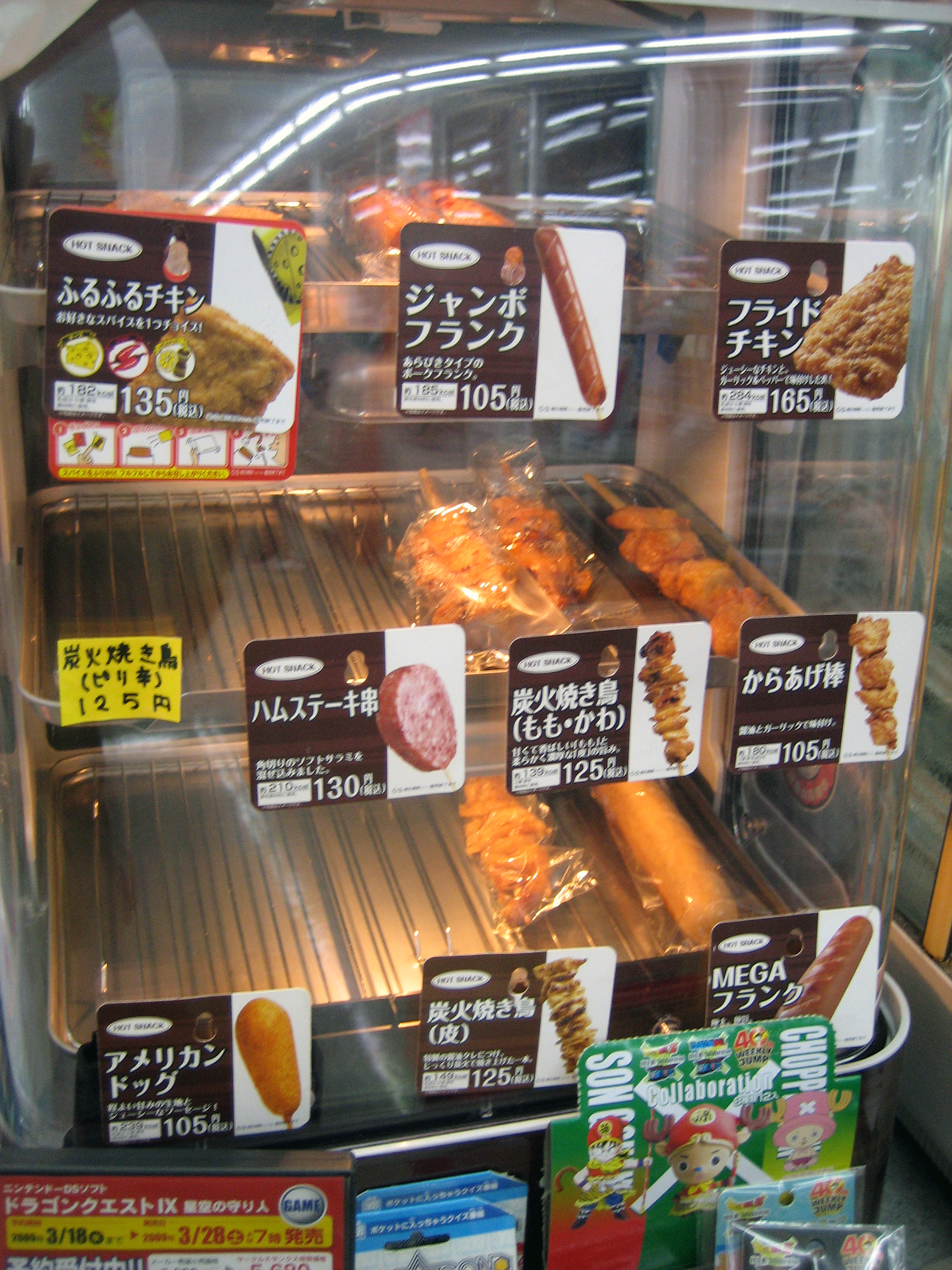 日本のコンビニエンスストアチェーンのサークルKサンクスの店頭で販売されているファーストフード。販売されているものはフライドチキンやアメリカンドッグなど。